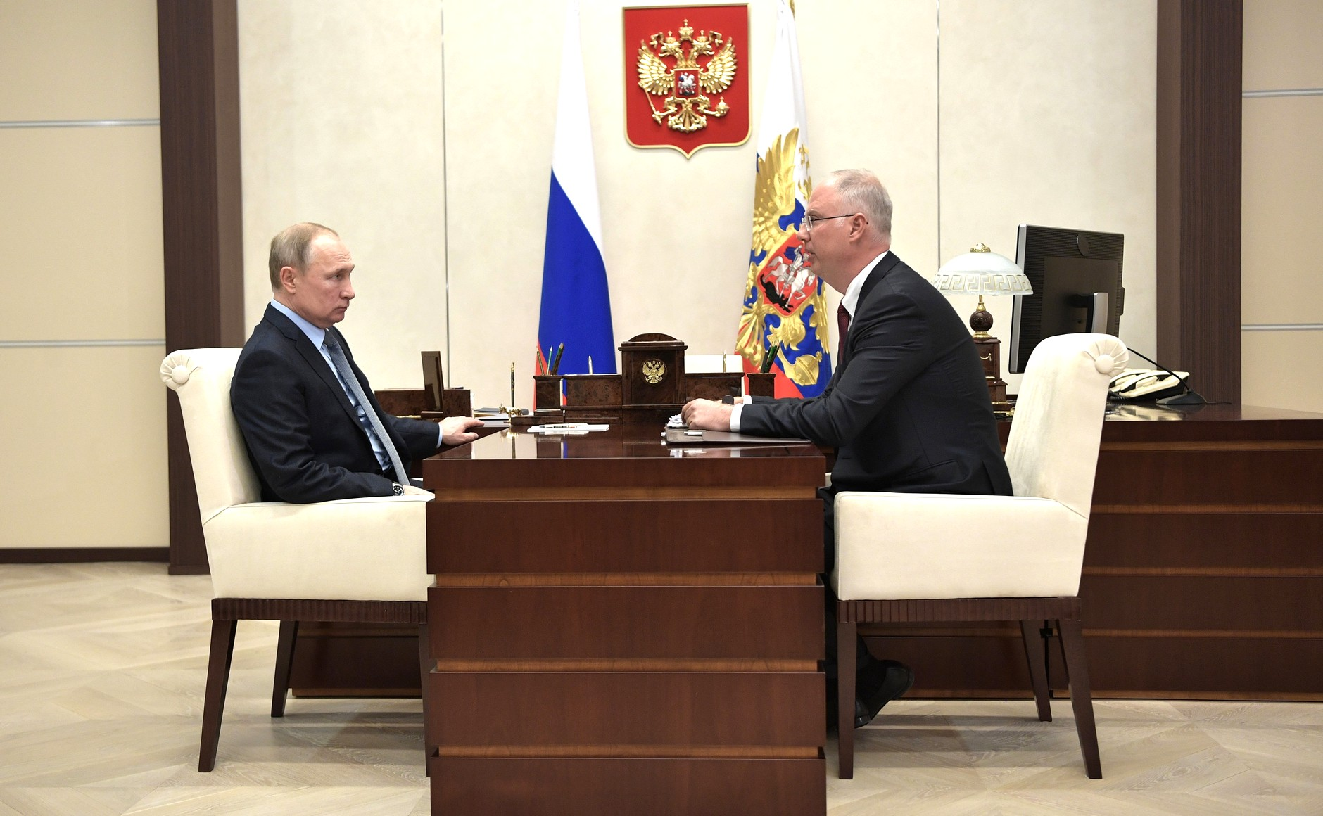 Встреча Владимира Путина и Кирилла Дмитриева